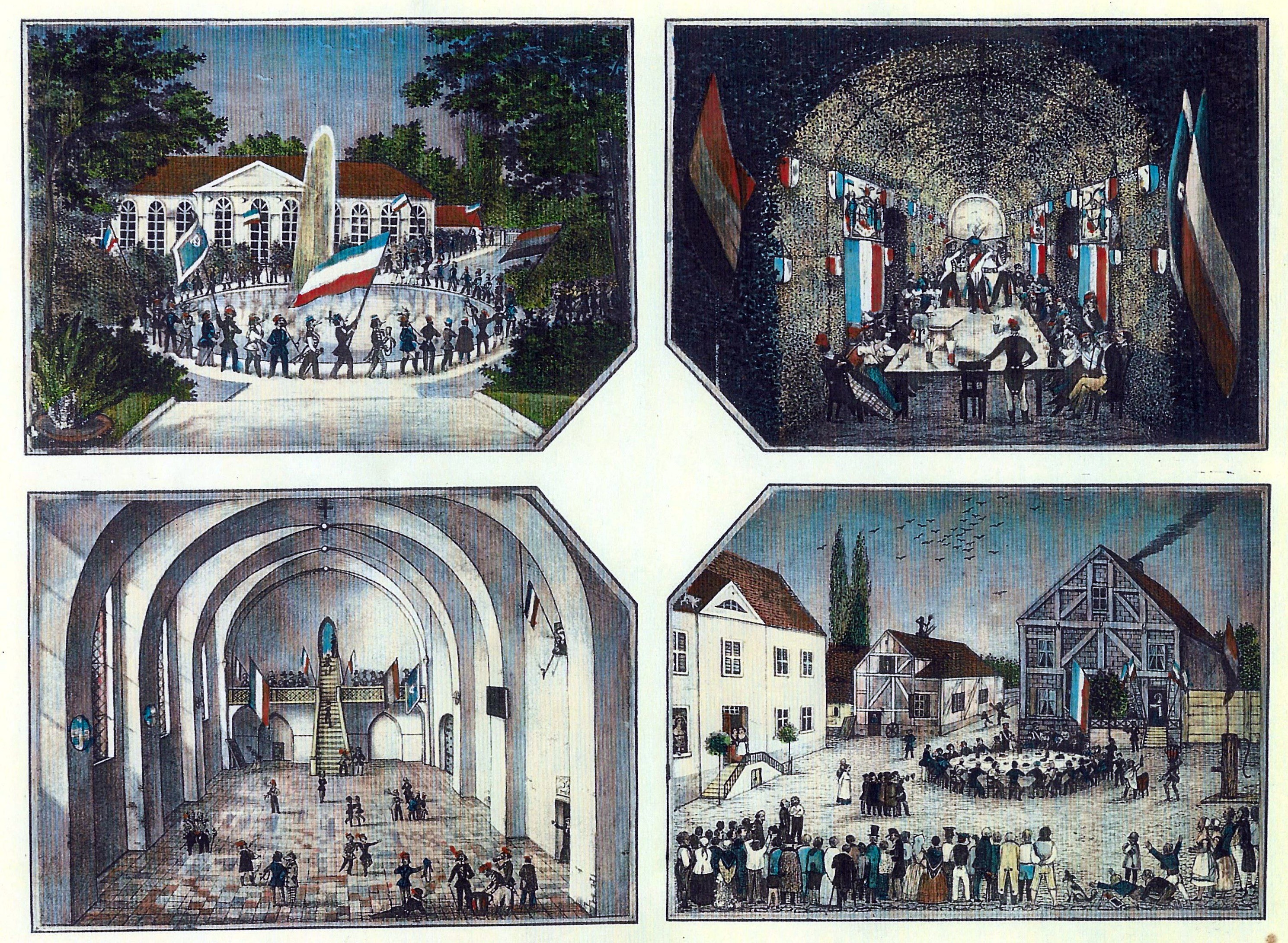 Szenen vom 18. Stiftungsfest des Corps Masovia im Jahre 1848, nach dem Leben gezeichnet von Louis Clericus: Der Einzug in Cadinen. Der „Landesvater“ bei der Festkneipe im Cadiner Schlossgarten. Frühstück im Cadiner Kloster. Bewirtung auf dem Marktplatz in Tolkemit.